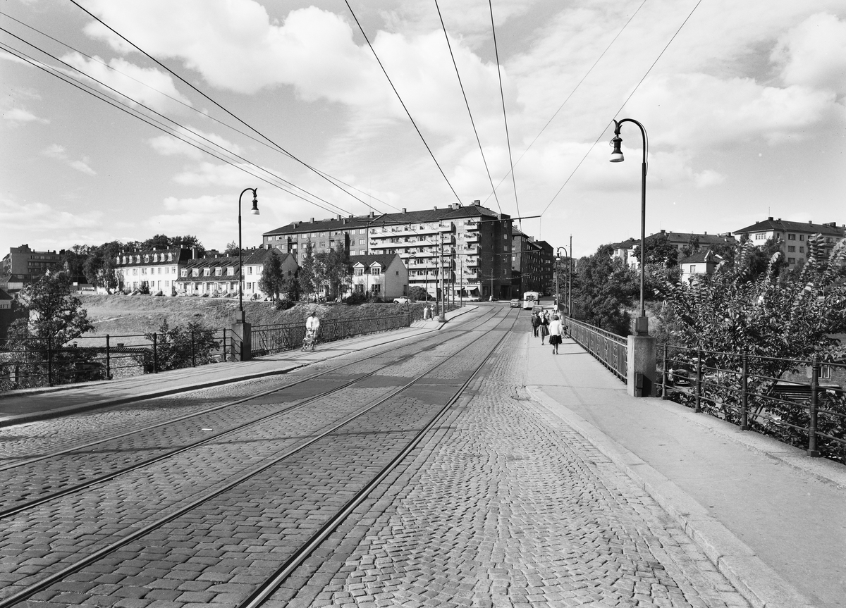 Bentsebrua, gateløp, gatelegeme, brosten, trikkeskinner, mennesker, bro, gatebelysning, rekkehus, bygårder, boligblokker, Arendalsgata, Bentsebrugata, Bentsegata